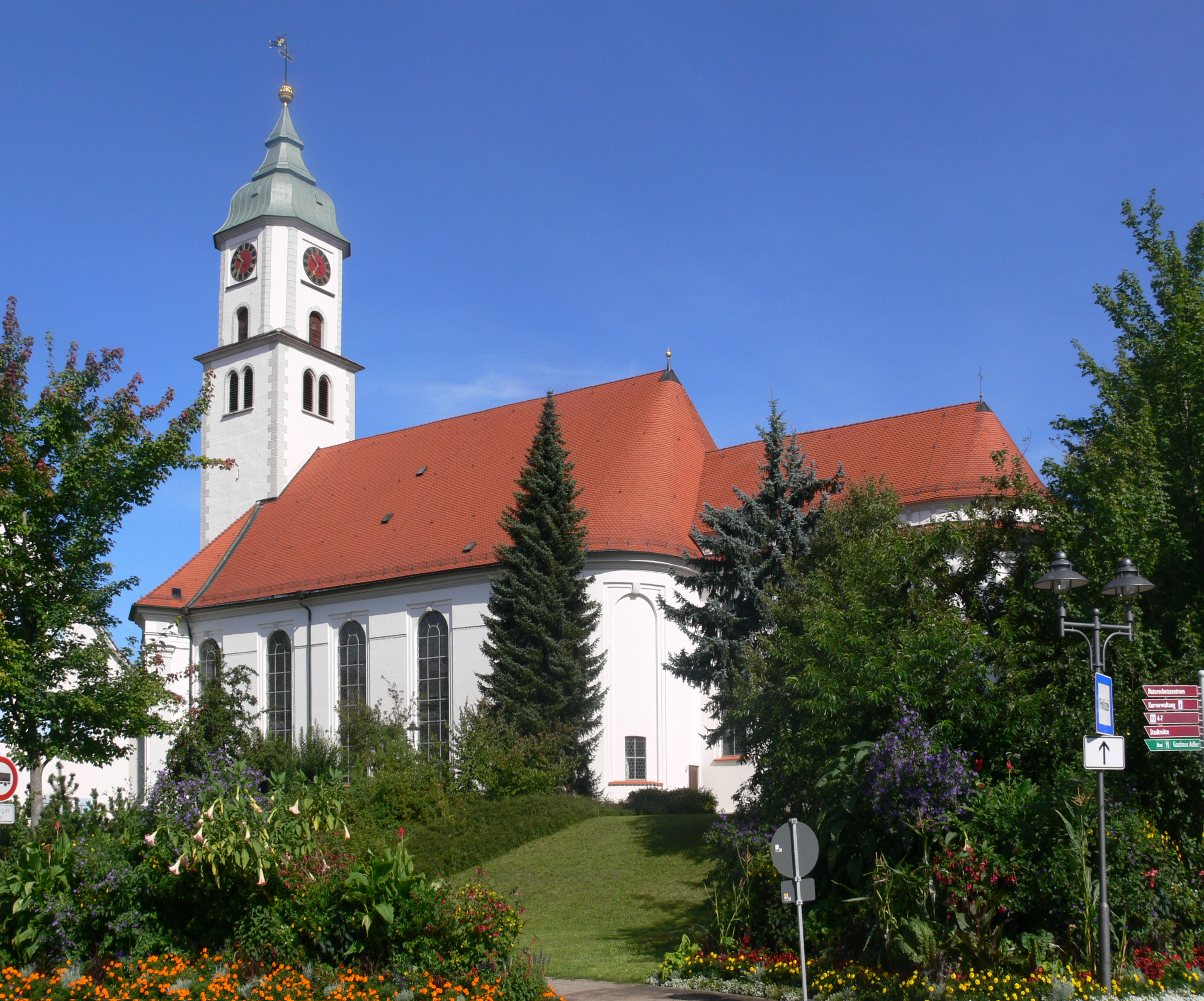 Pfarrkirche St. Verena, Bad Wurzach, Landkreis Ravensburg